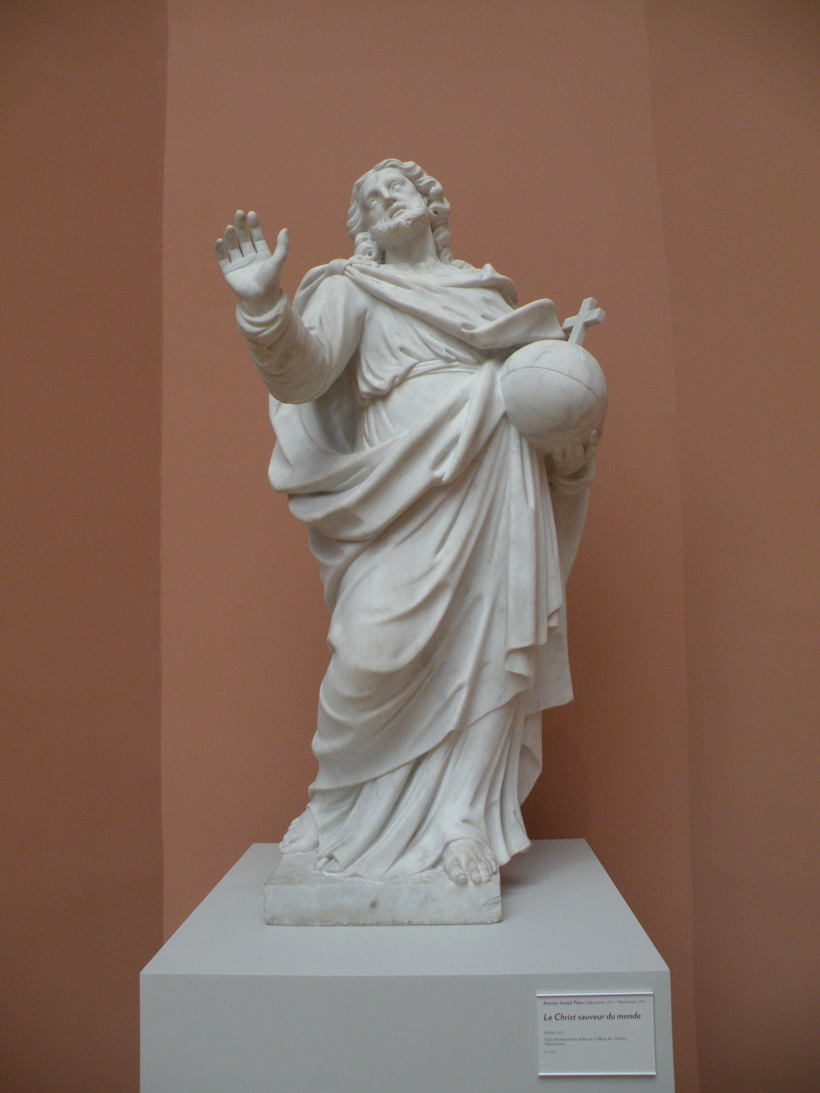 Sculptures in the Musée des Beaux-Arts de Valenciennes